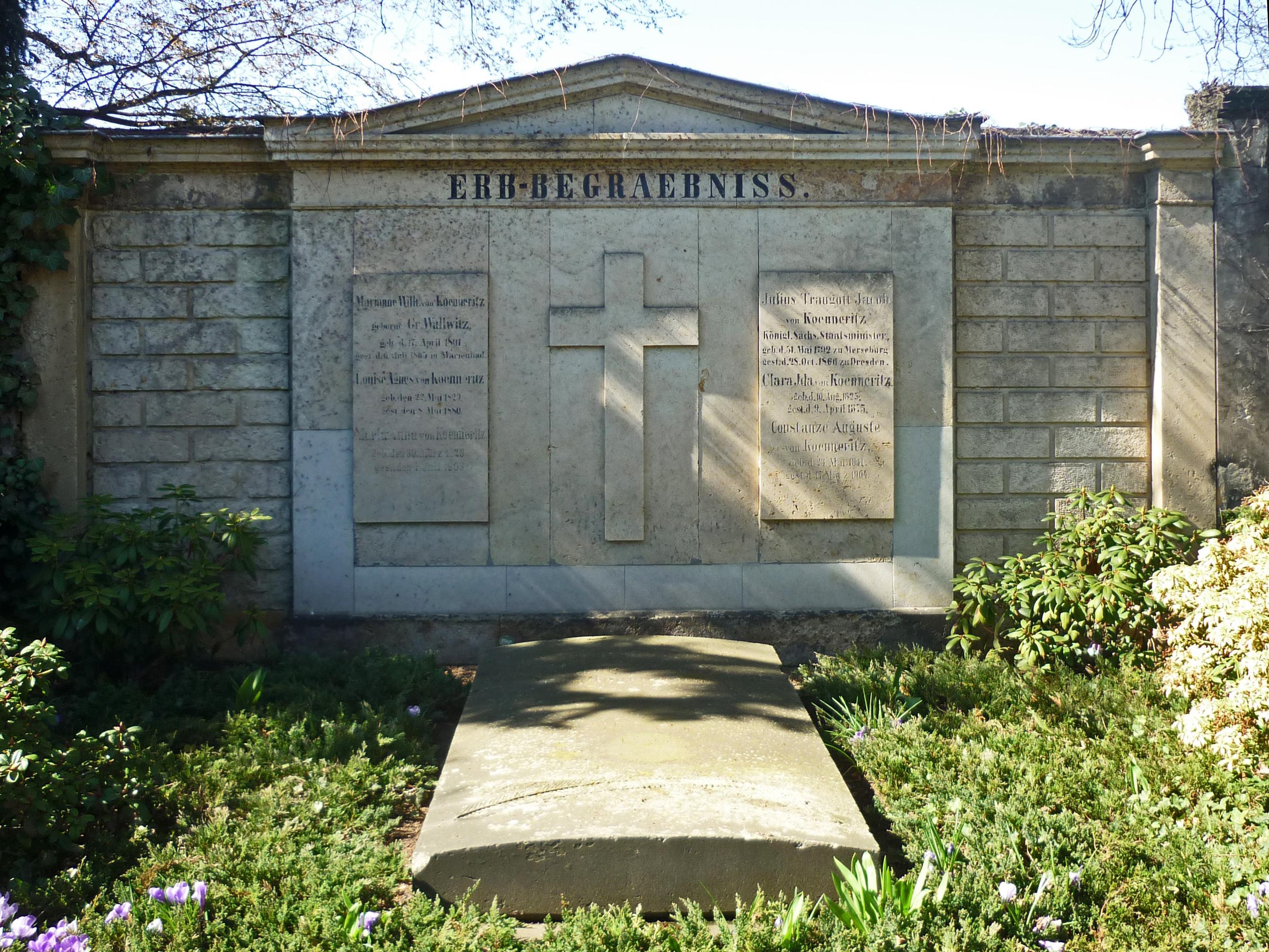 Grabstätte von Julius Traugott Jacob von Könneritz (1792–1866), königl.-sächs. Staatsminister und Vorsitzender des sächsischen Gesamtministeriums, auf dem Trinitatisfriedhof in Dresden